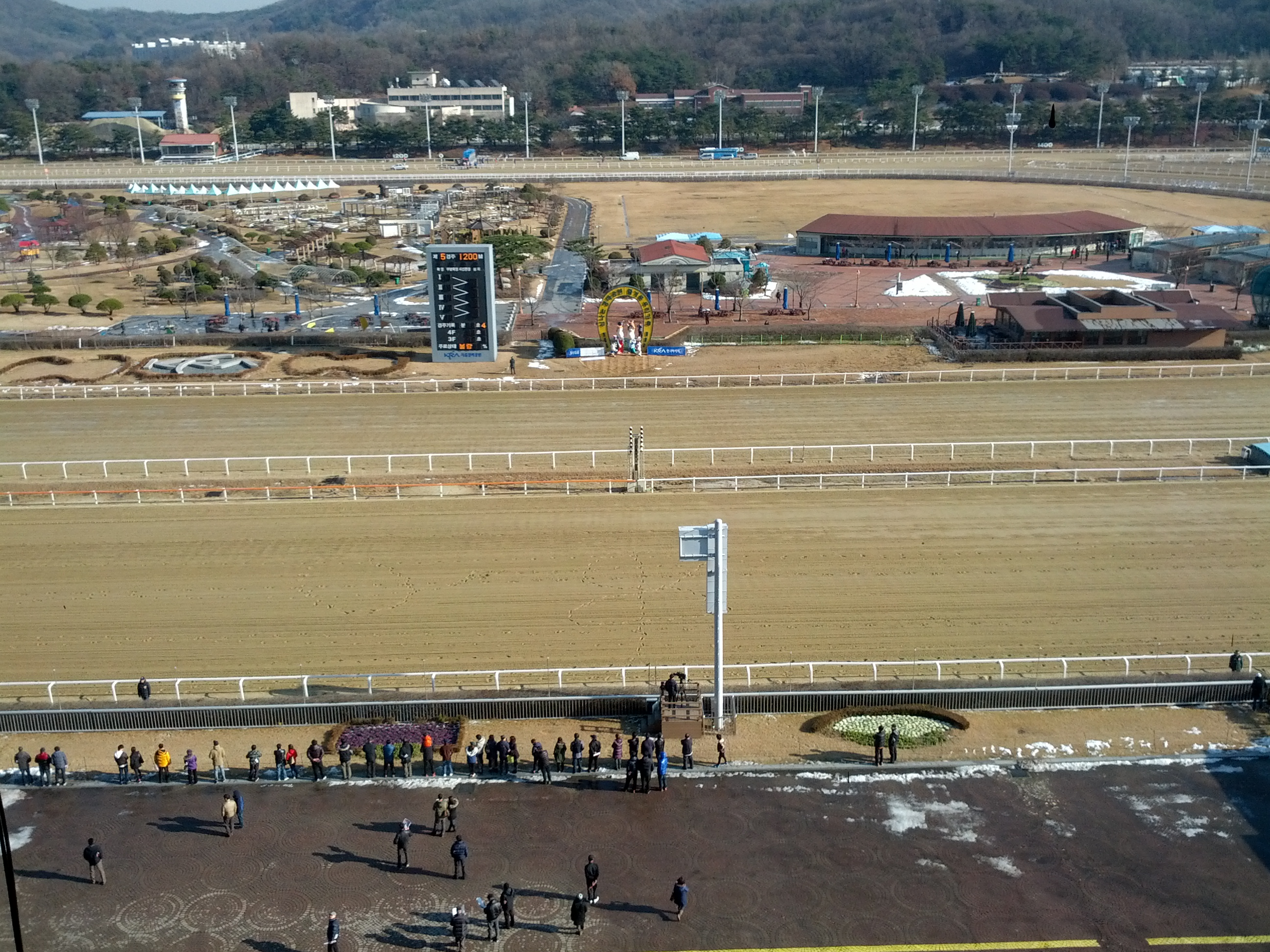 서울경마공원 결승선